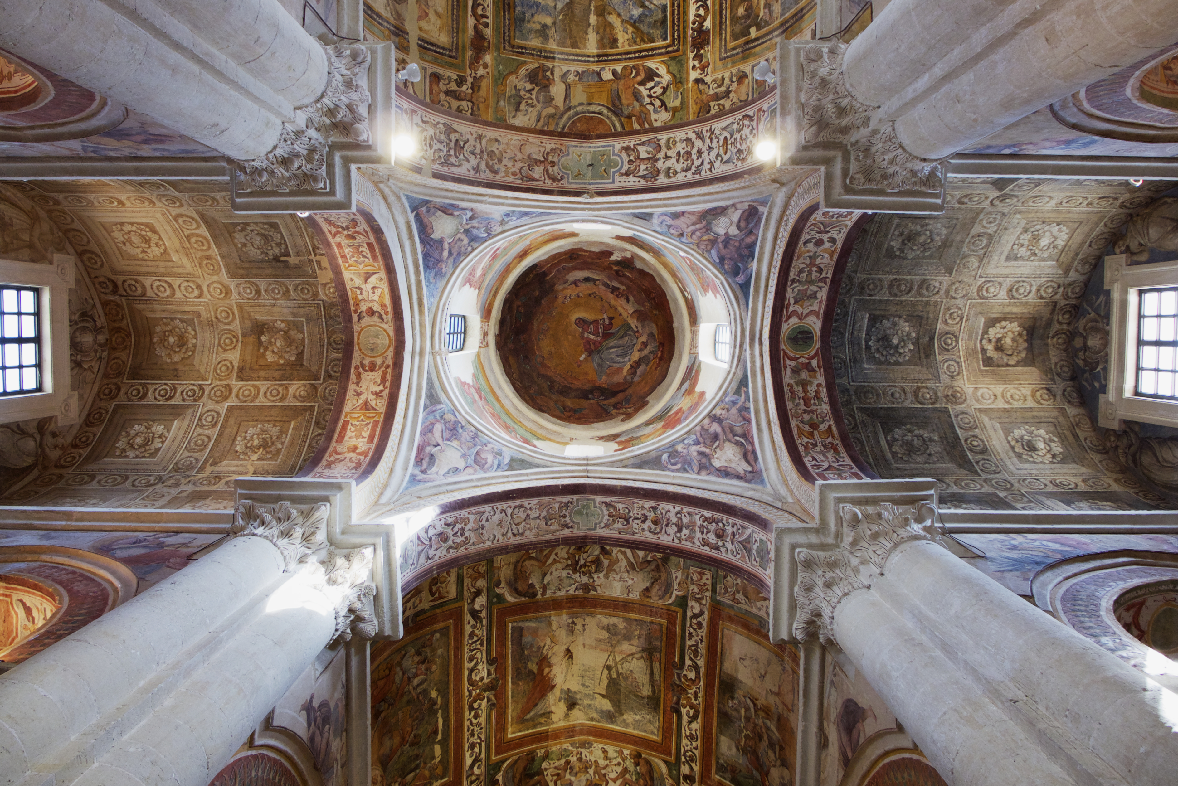 Chiesa dei Santi Niccolò e Cataldo This is a photo of a monument which is part of cultural heritage of Italy.